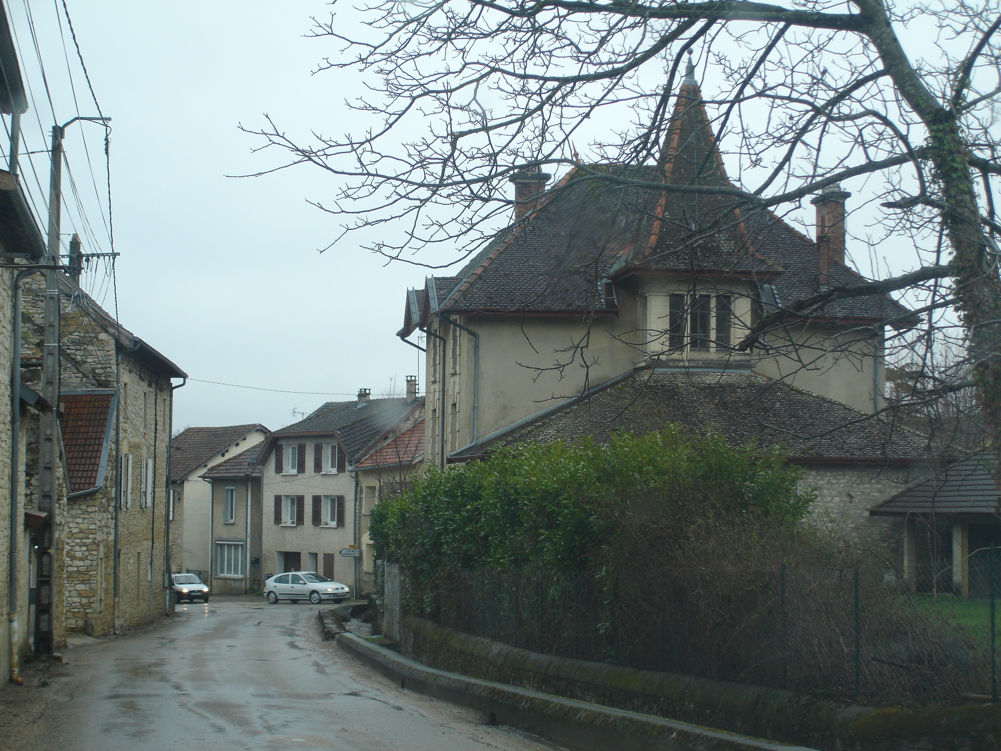 Vénérieu (38) : le centre du village